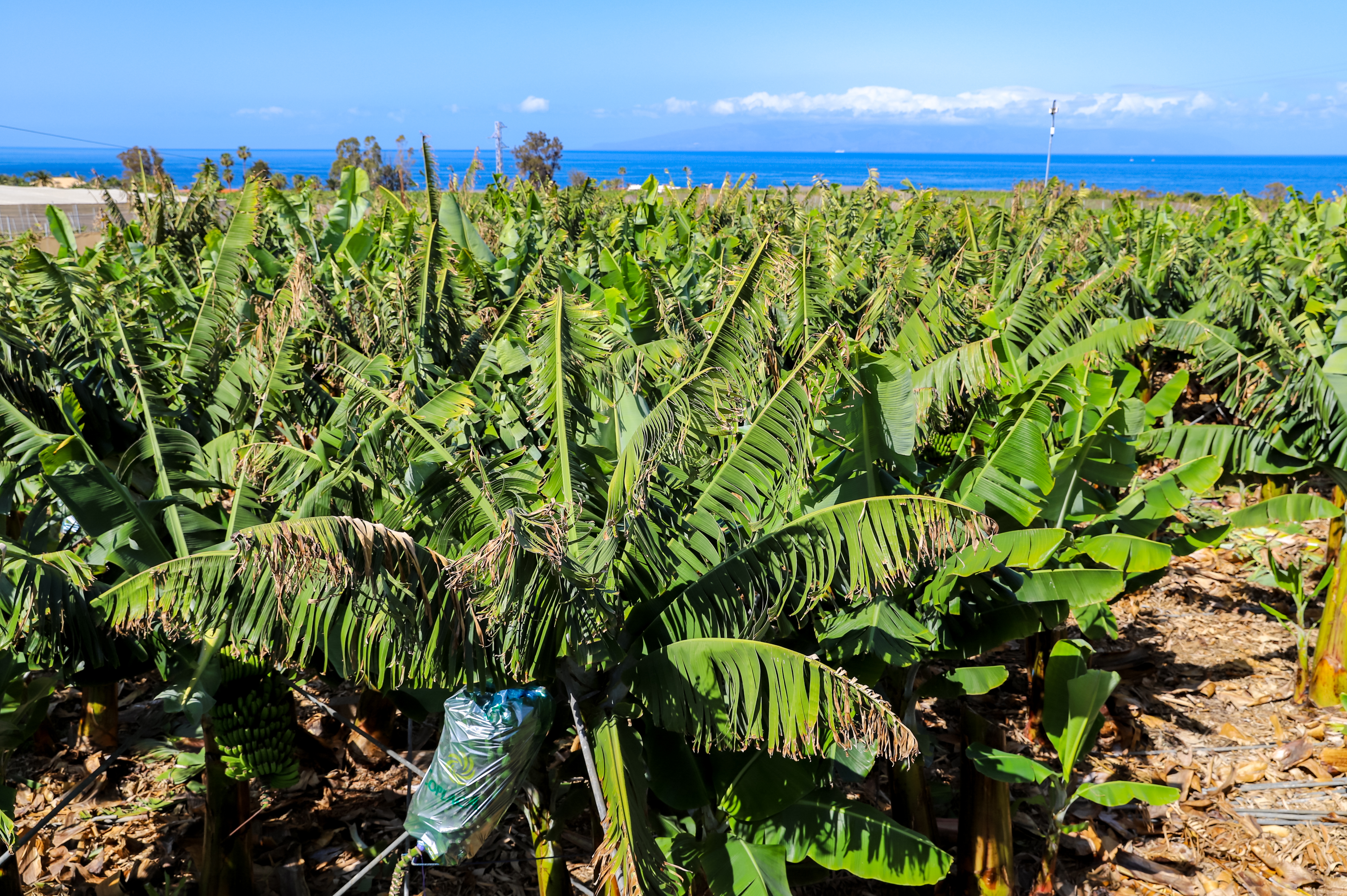 Tenerife